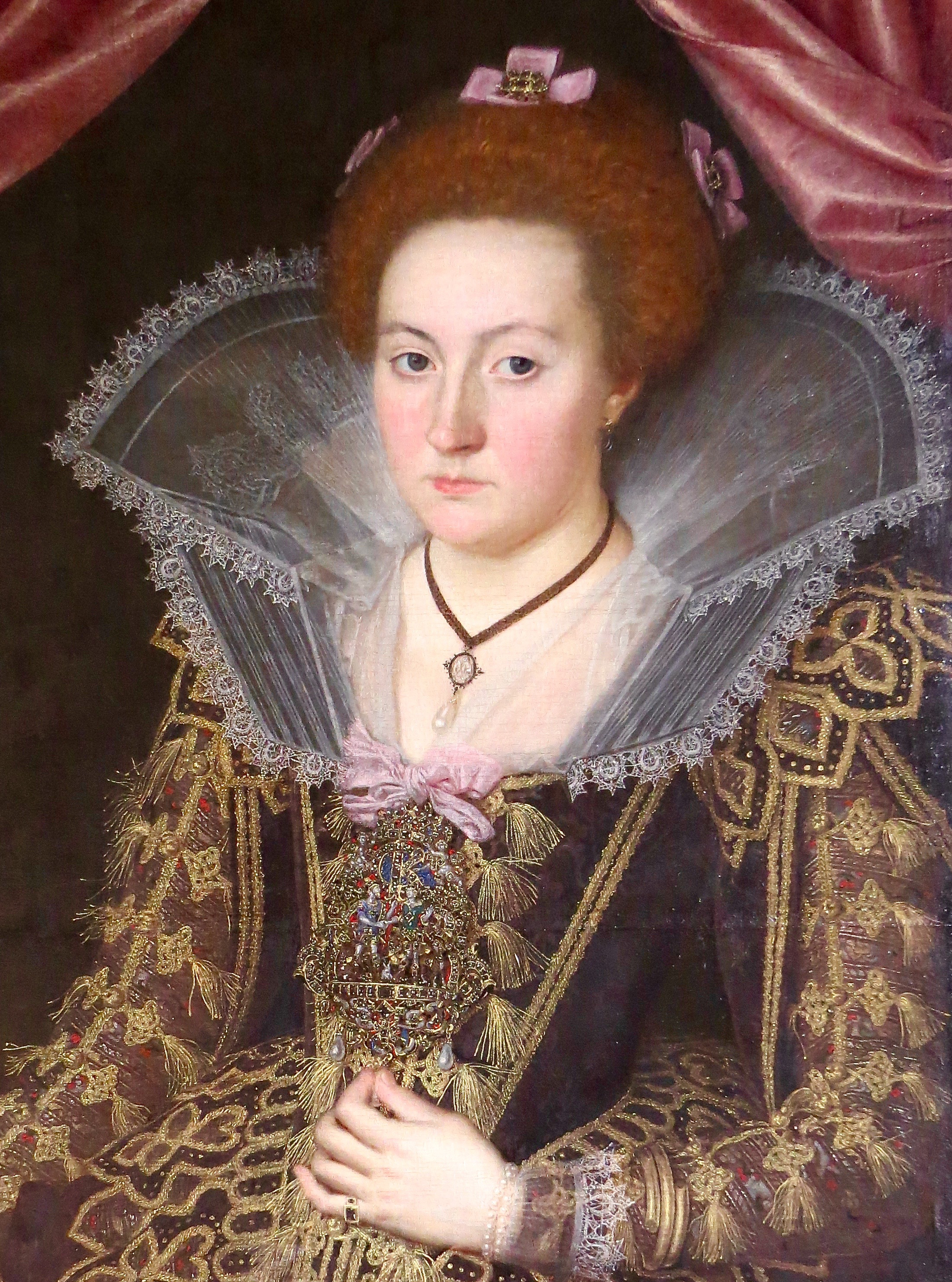 Kirsten Munk, udsnit af Jacob van Dorts maleri, Frederiksborg Slot, Sjælland